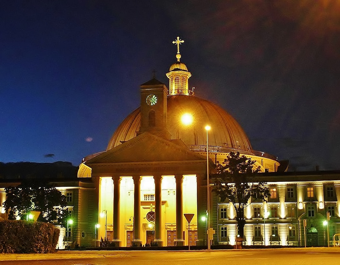 Bazylika Mniejsza p.w. św. Wincentego a'Paulo w Bydgoszczy - o zmierzchu